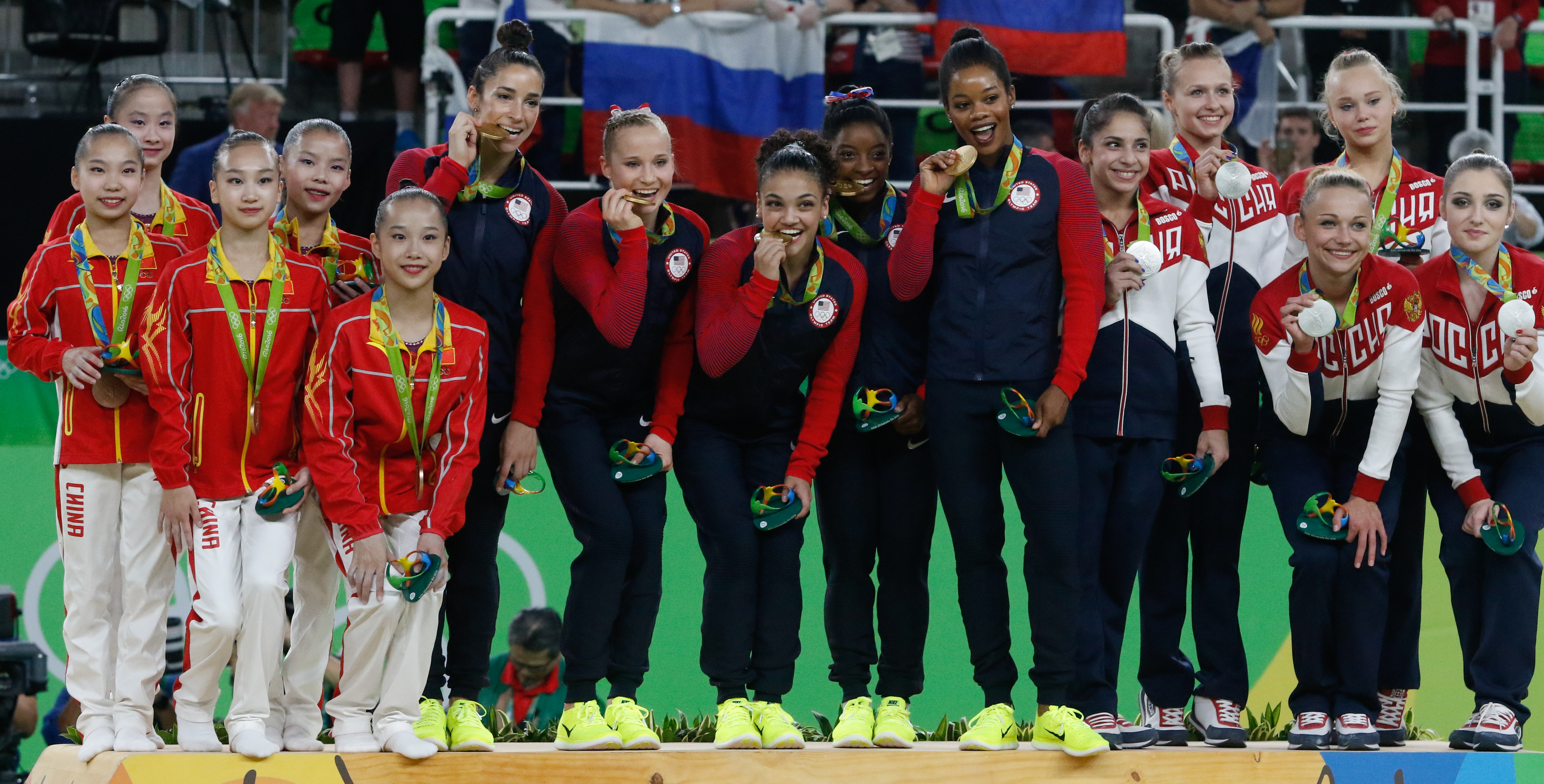 Rio de Janeiro - Ginastas dos Estados Unidos levam medalha de ouro na disputa por equipes feminina nos Jogos Olímpicos Rio 2016, Rússia fica com a prata e China, o bronze. (Fernando Frazão/Agência Brasil)